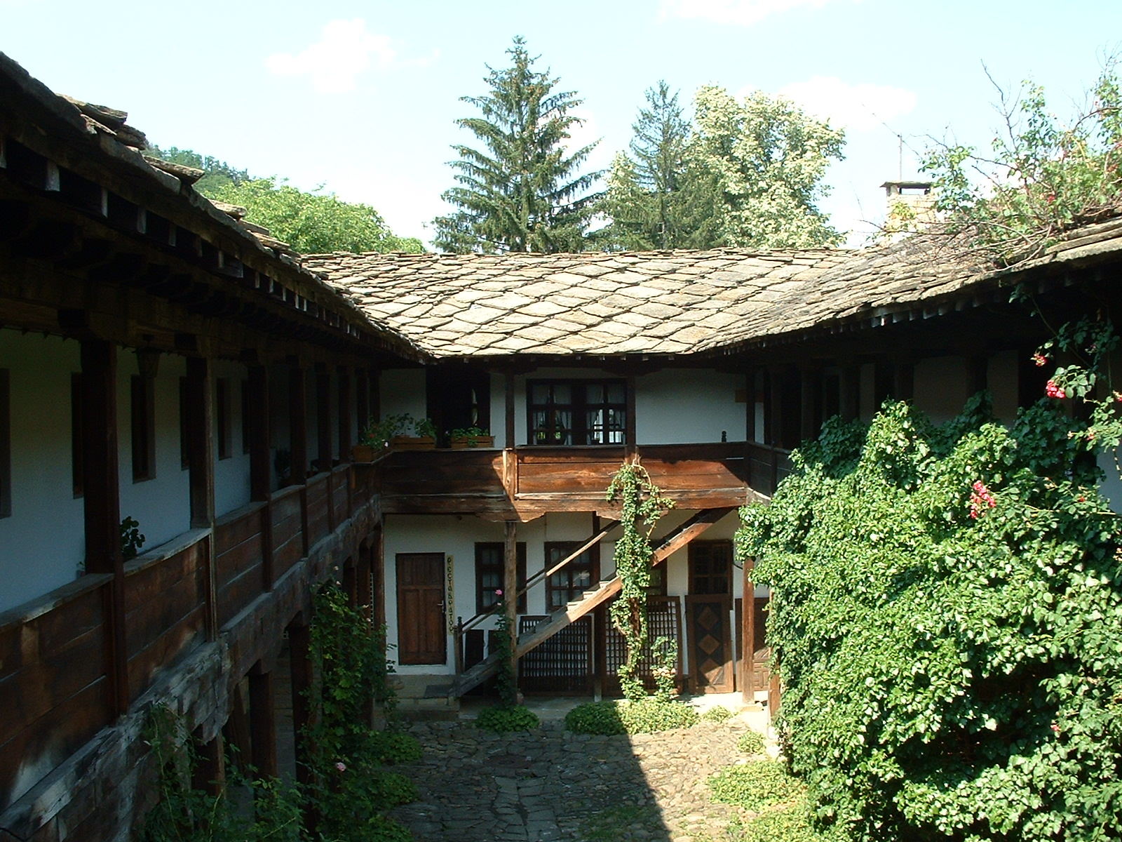 Старото школо в Трявна